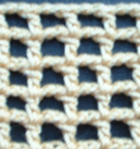 Häkelfilet